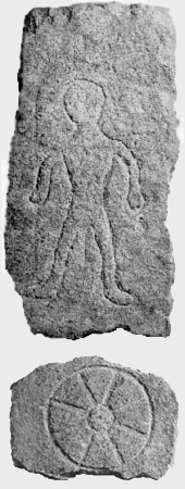 Descrizione: Stele di Castionetto di Chiuro Luogo: Conservata presso il Museo Valtellinese di Storia e Arte a Sondrio